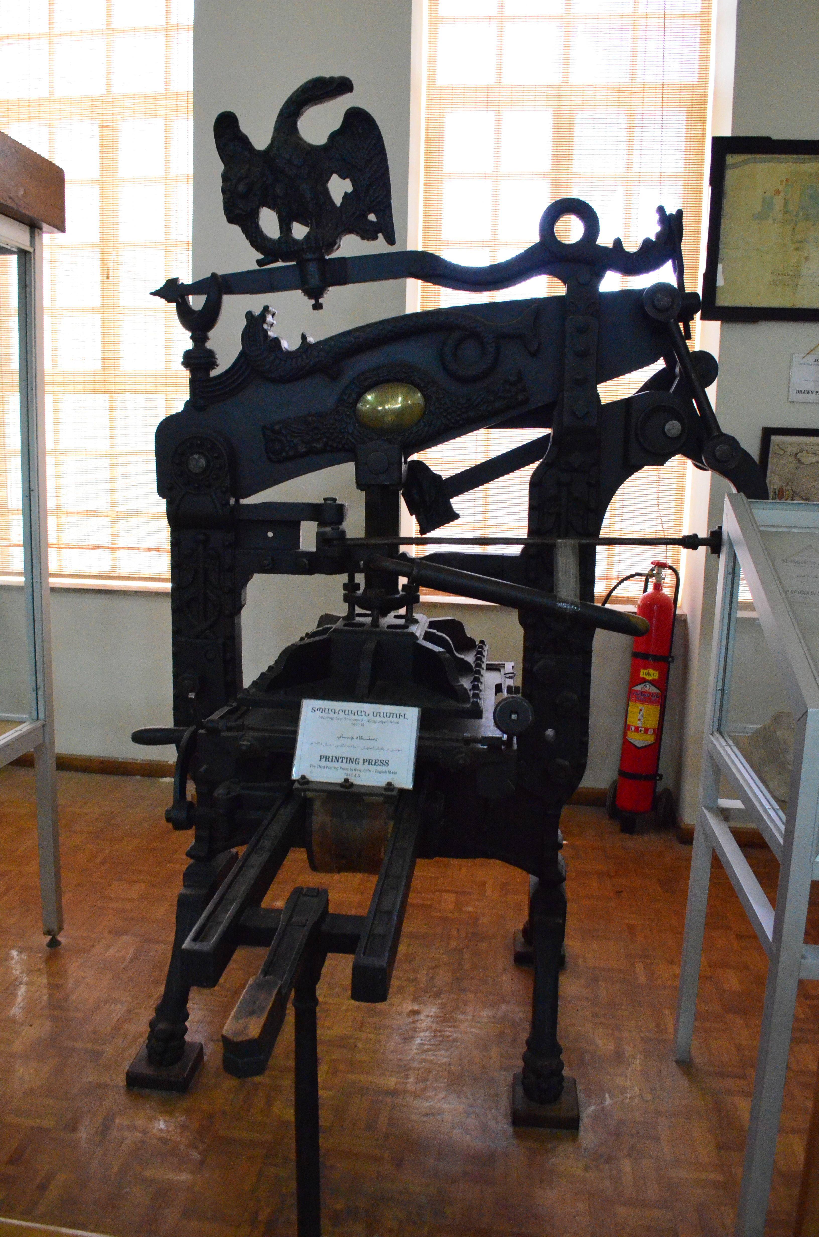 کلیسای وانک، اصفهان، ایران